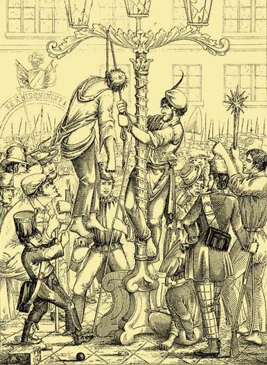 Theodor Baillet de Latour akasztása Bécsben, 1848. október 6-án